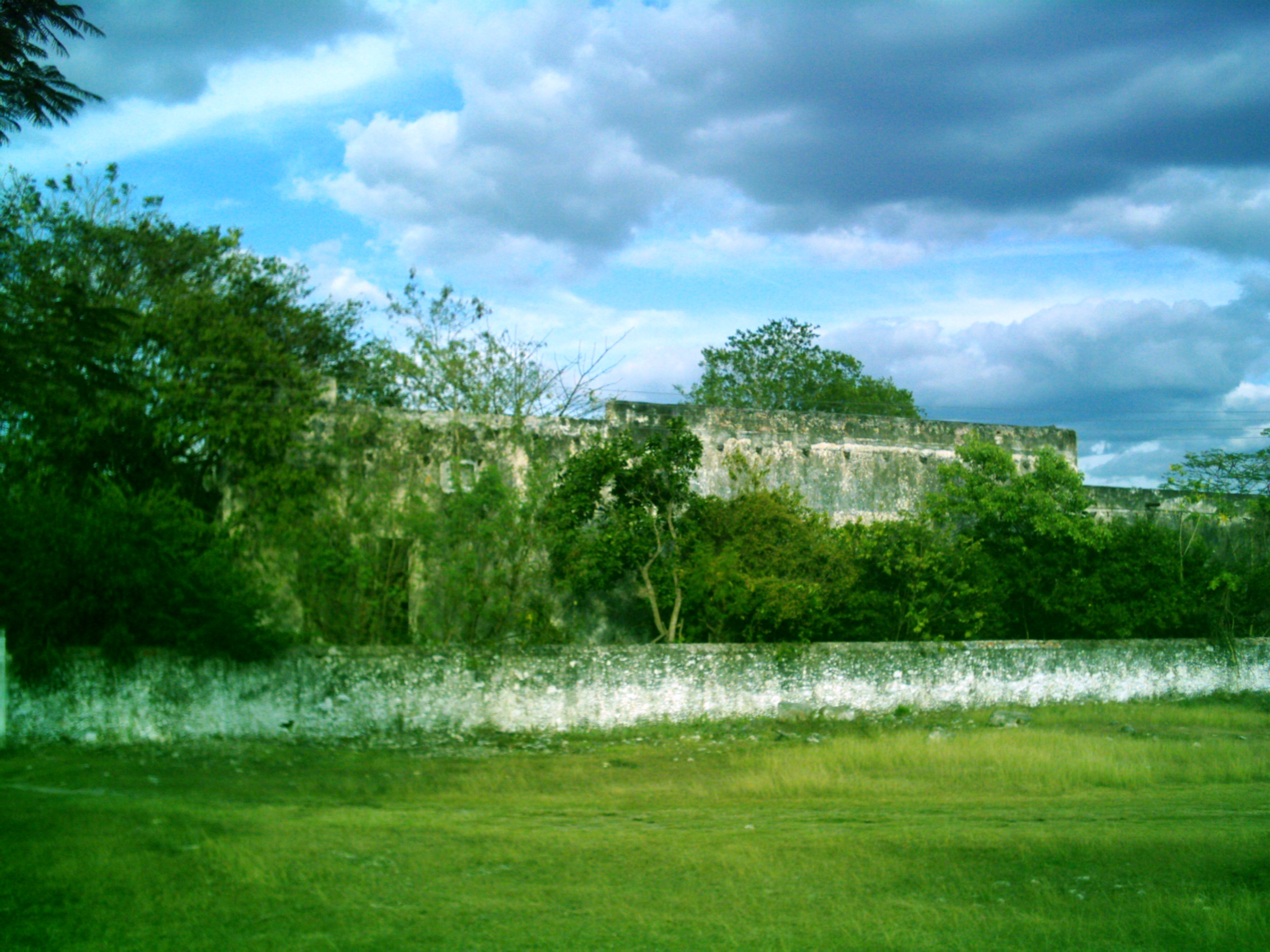 Hacienda de Santa Cruz (Municipio de Tixkokob), Yucatán.